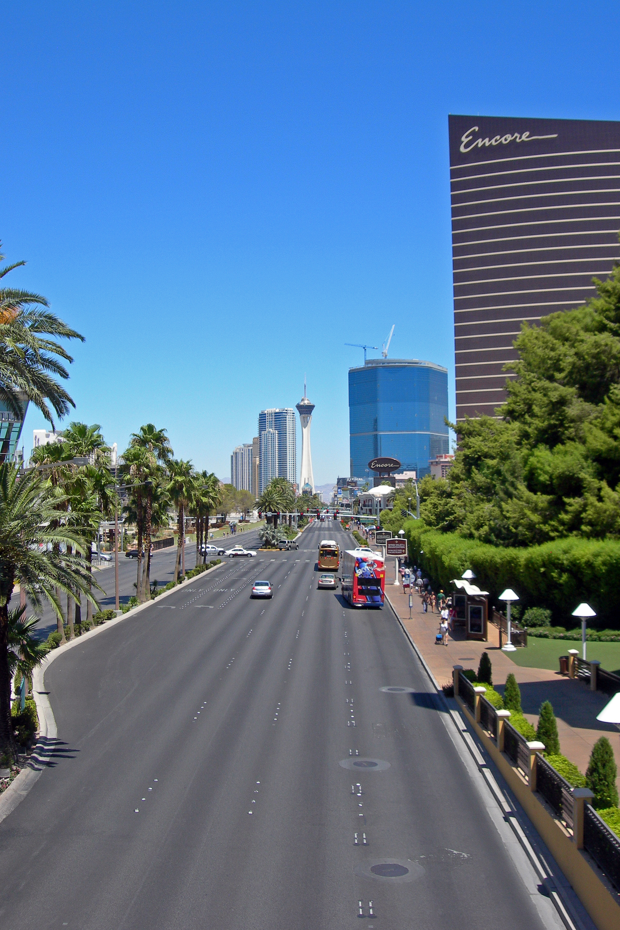 La Las Vegas Strip con vista dell'hotel Encore e la Stratosphere sullo sfondo